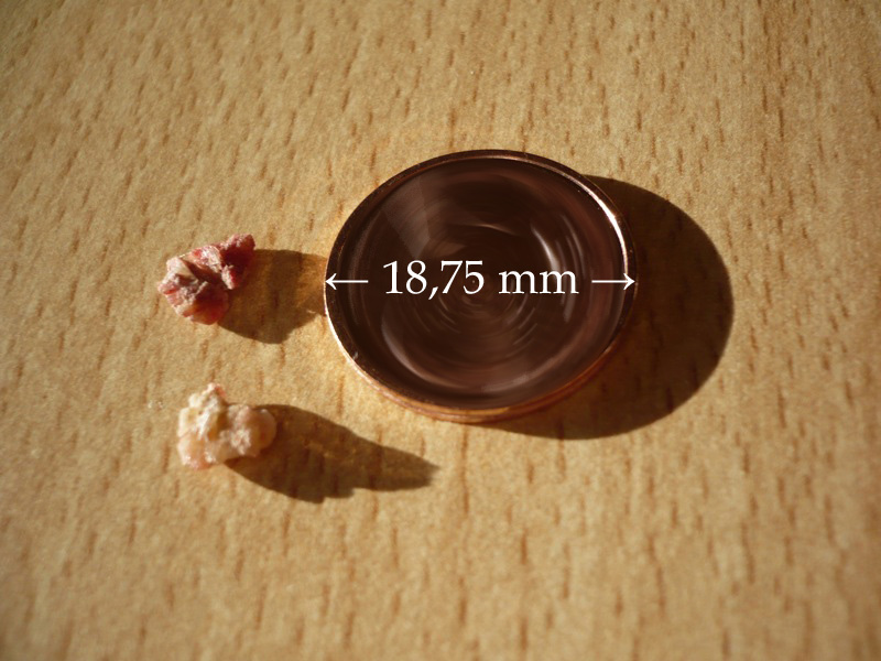 Zwei Nierensteine im Vergleich